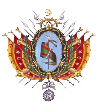 Het grote wapen van Tunesie als koninkrijk 1900